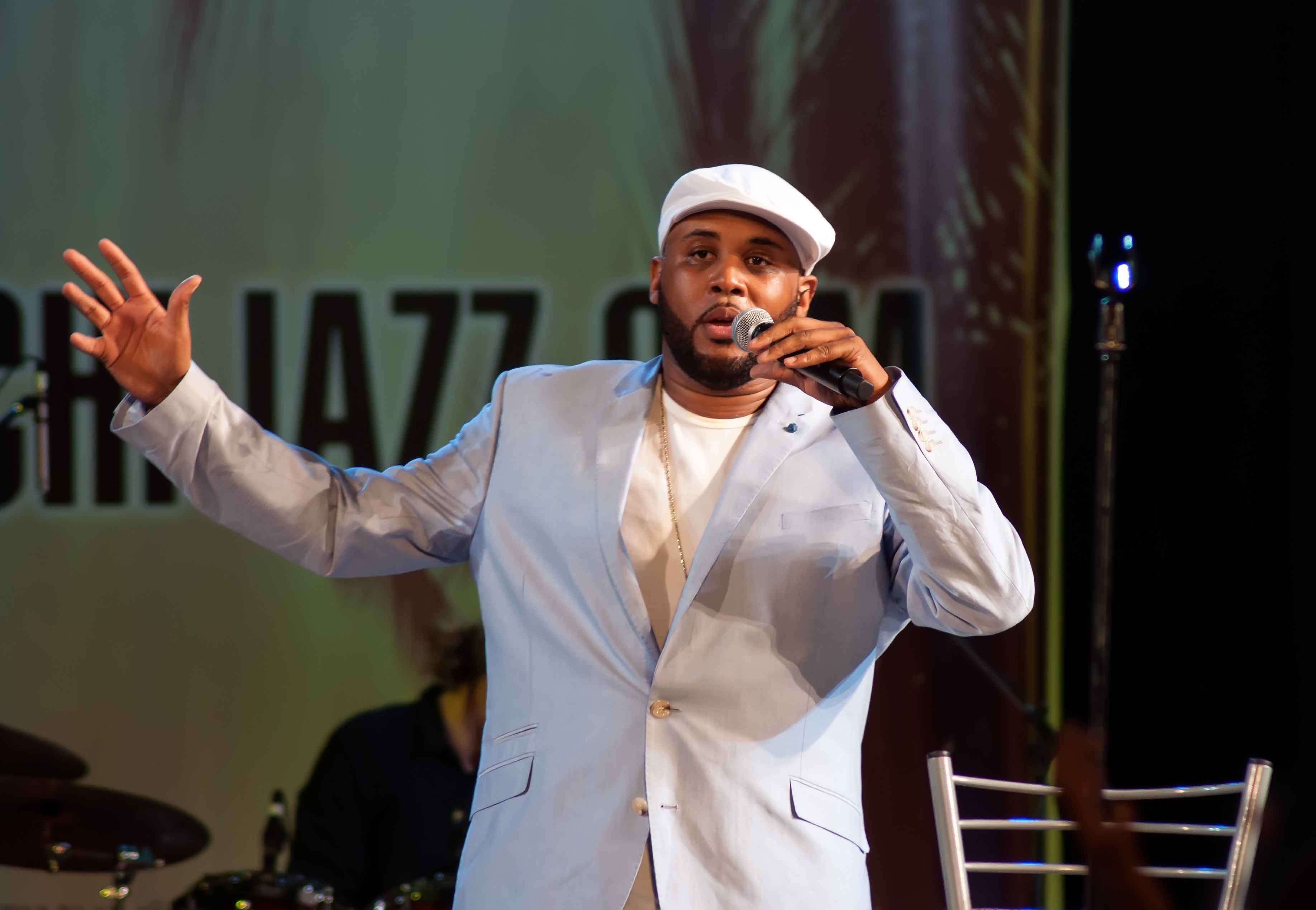 Sochi Jazz Festival